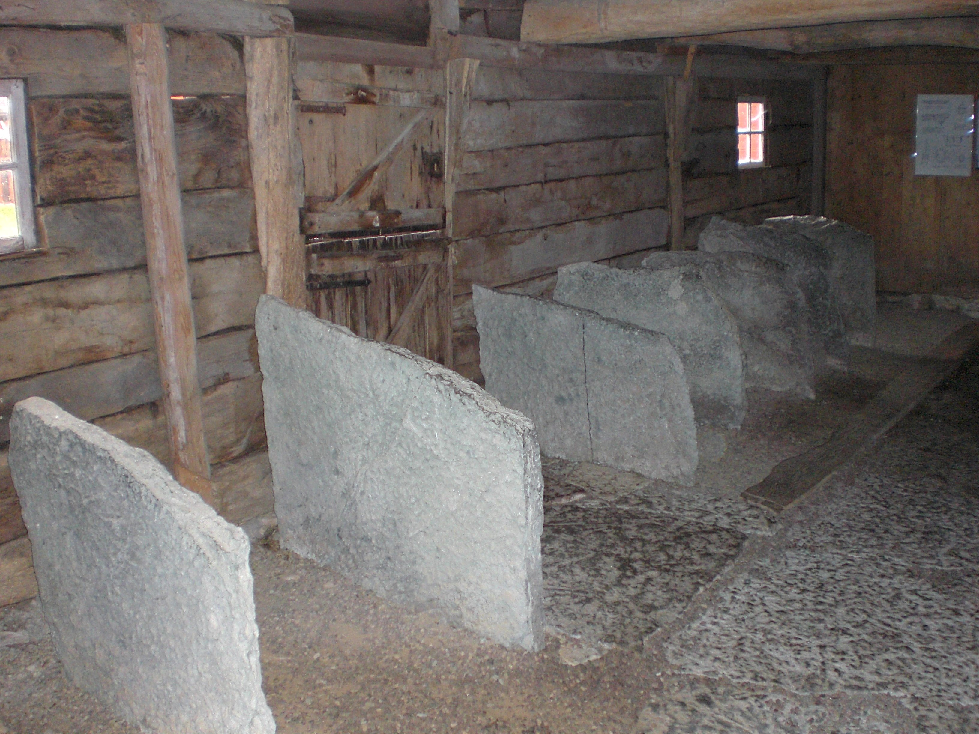 Boxen im nördlichen Stall des Freilichtmuseums Himmelsberga auf Öland